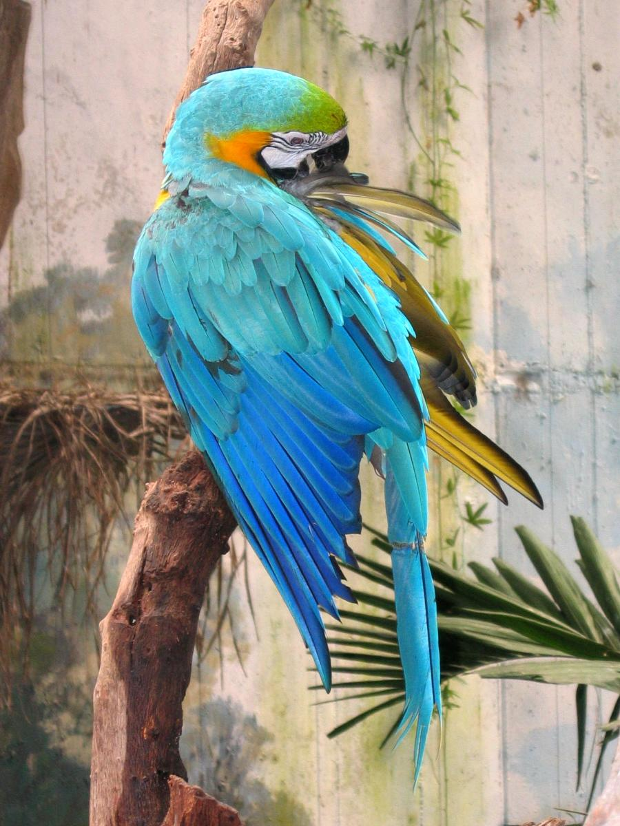 self made.